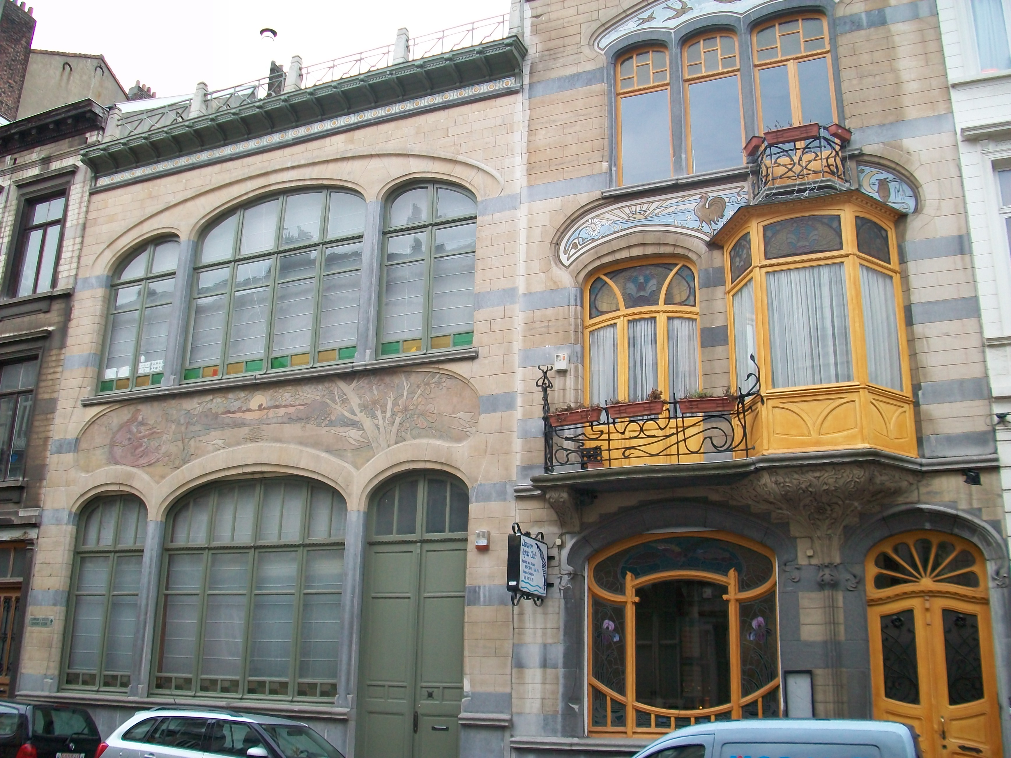 darwin 15.17